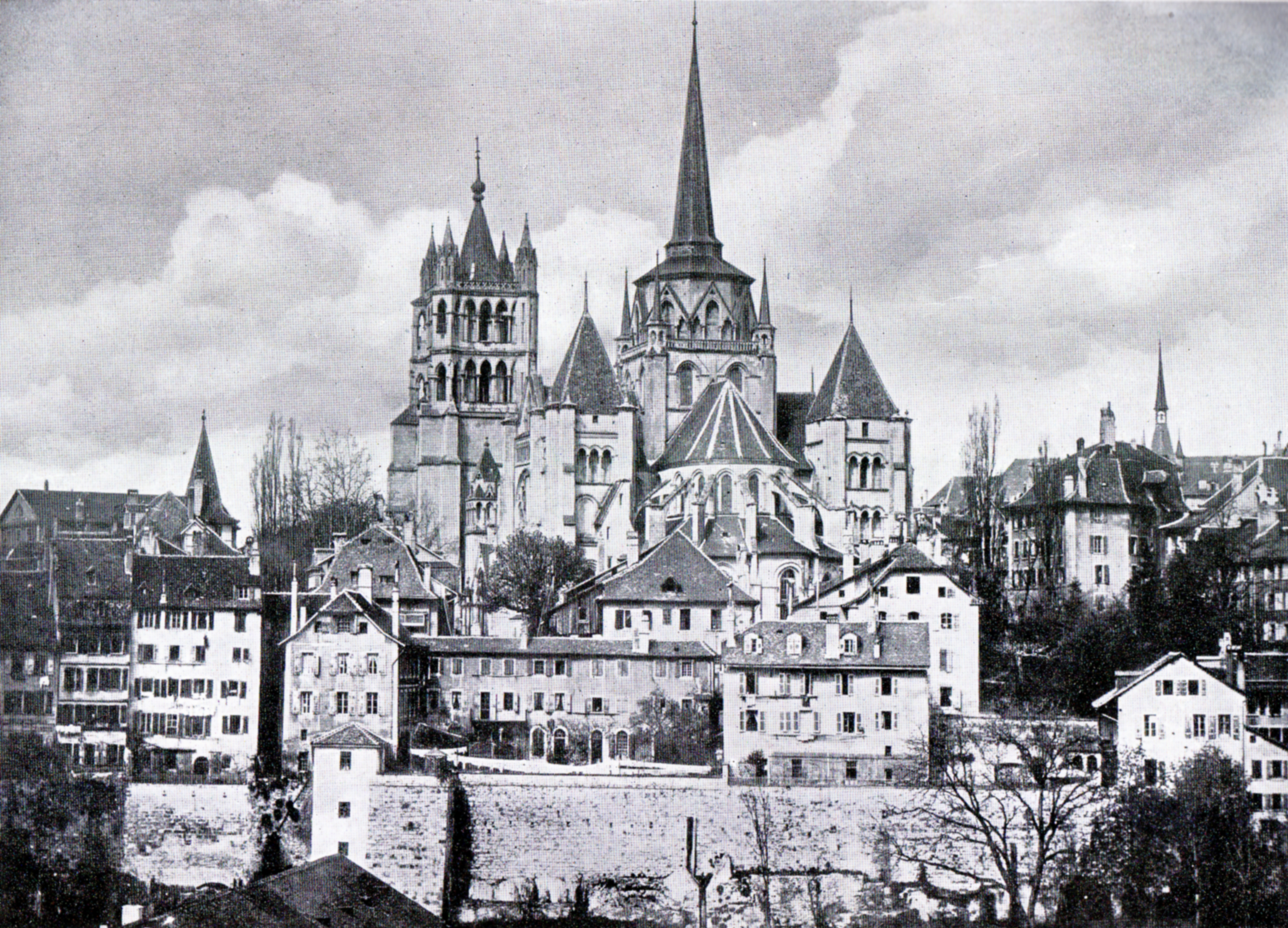 Die Kathedrale Notre-Dame in Lausanne ca. 1873 vor der Restaurierung des Vierungsturms